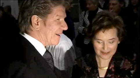 Filmproduzent Andres Brütsch und Elisabeth Kopp an der Premierenfeier des Dokumentarfilms "Elisabeth Kopp - Eine Winterreise" an den 42. Solothurner Filmtagen im Palais Besenval, Solothurn